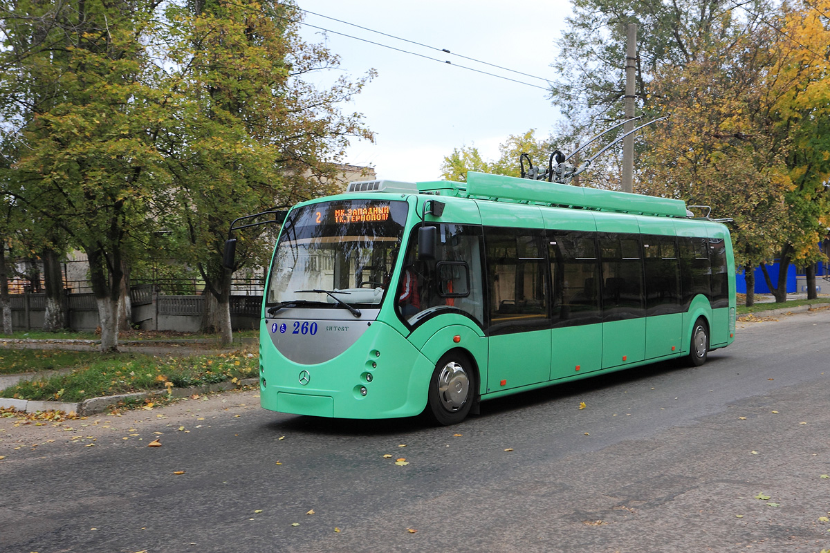 Троллейбус АКСМ-420 на маршруте №2. Тирасполь, улица Гвардейская